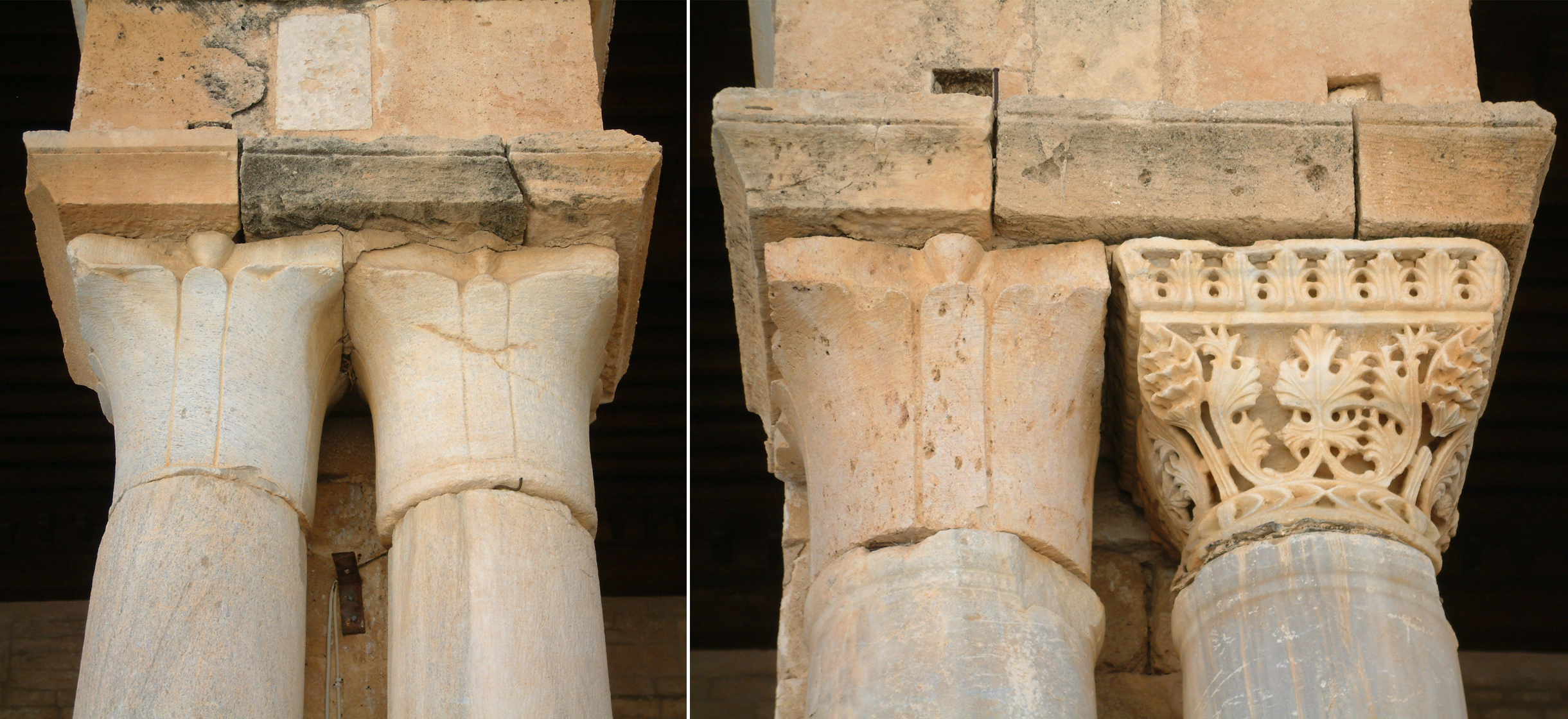 Grande Mosquée de Kairouan (Tunisie) : gros plan sur quatre chapiteaux de la façade du portique sud de la cour, trois d'entre eux sont hafsides, le quatrième est byzantin.